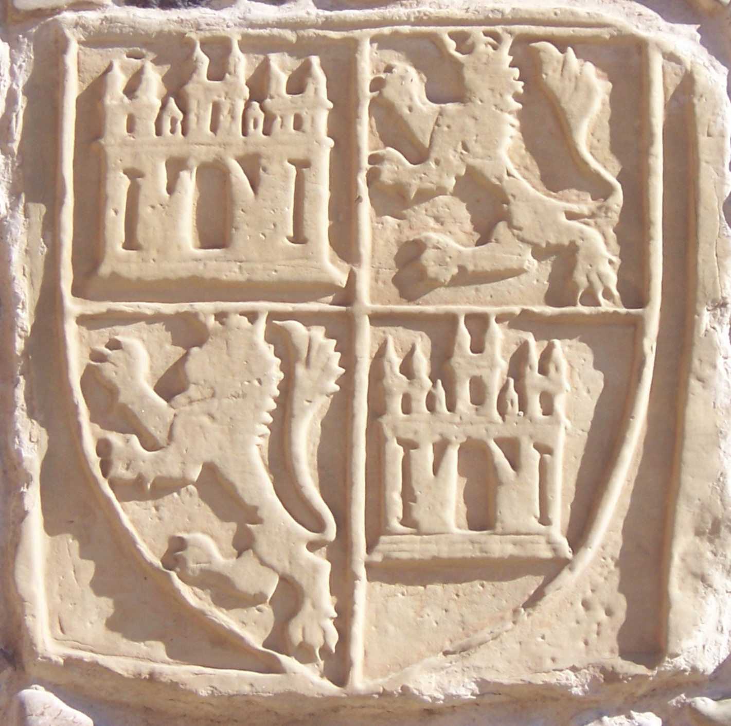 Escudo de Castilla y León en Alhóndiga de Santo Domingo de la Calzada (estuvo previamente en la muralla de la ciudad) - Siglo XIV